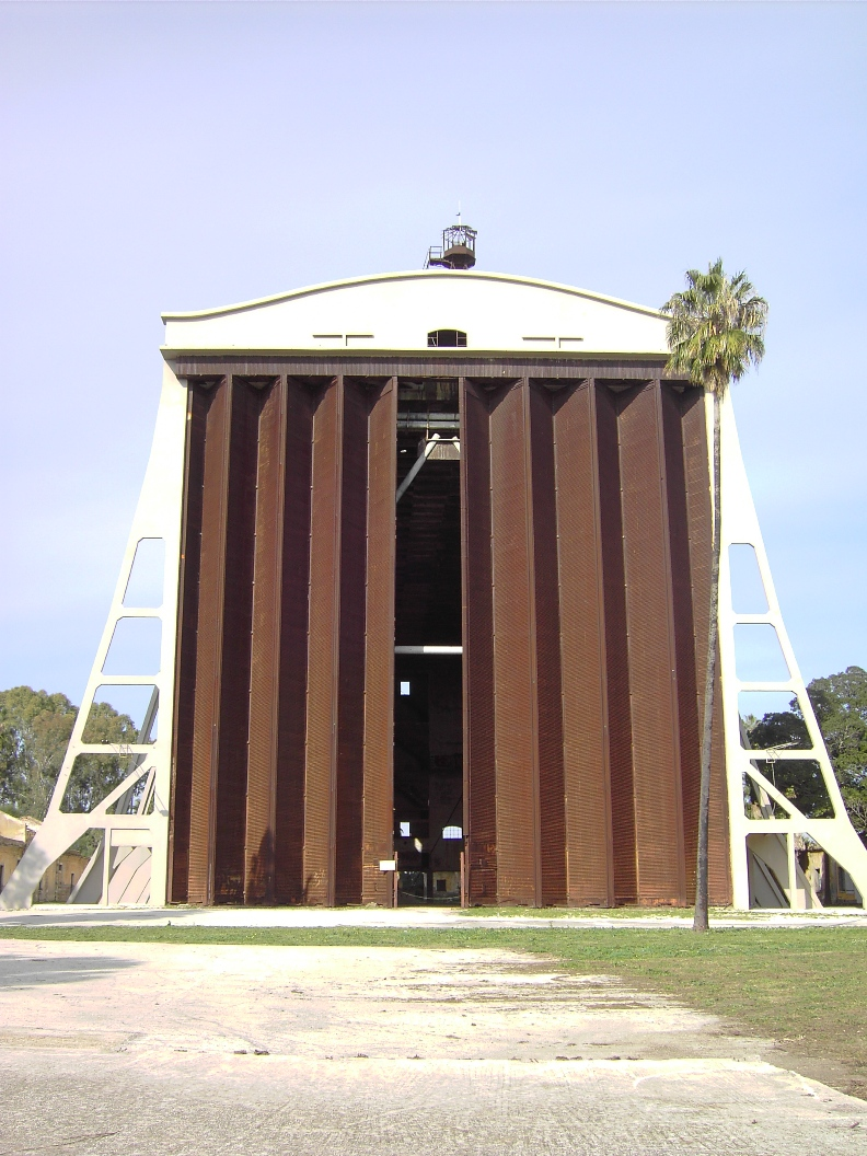 Facciata dell'hangar dirigibili di Augusta (Sicilia) - scattata da sud-est